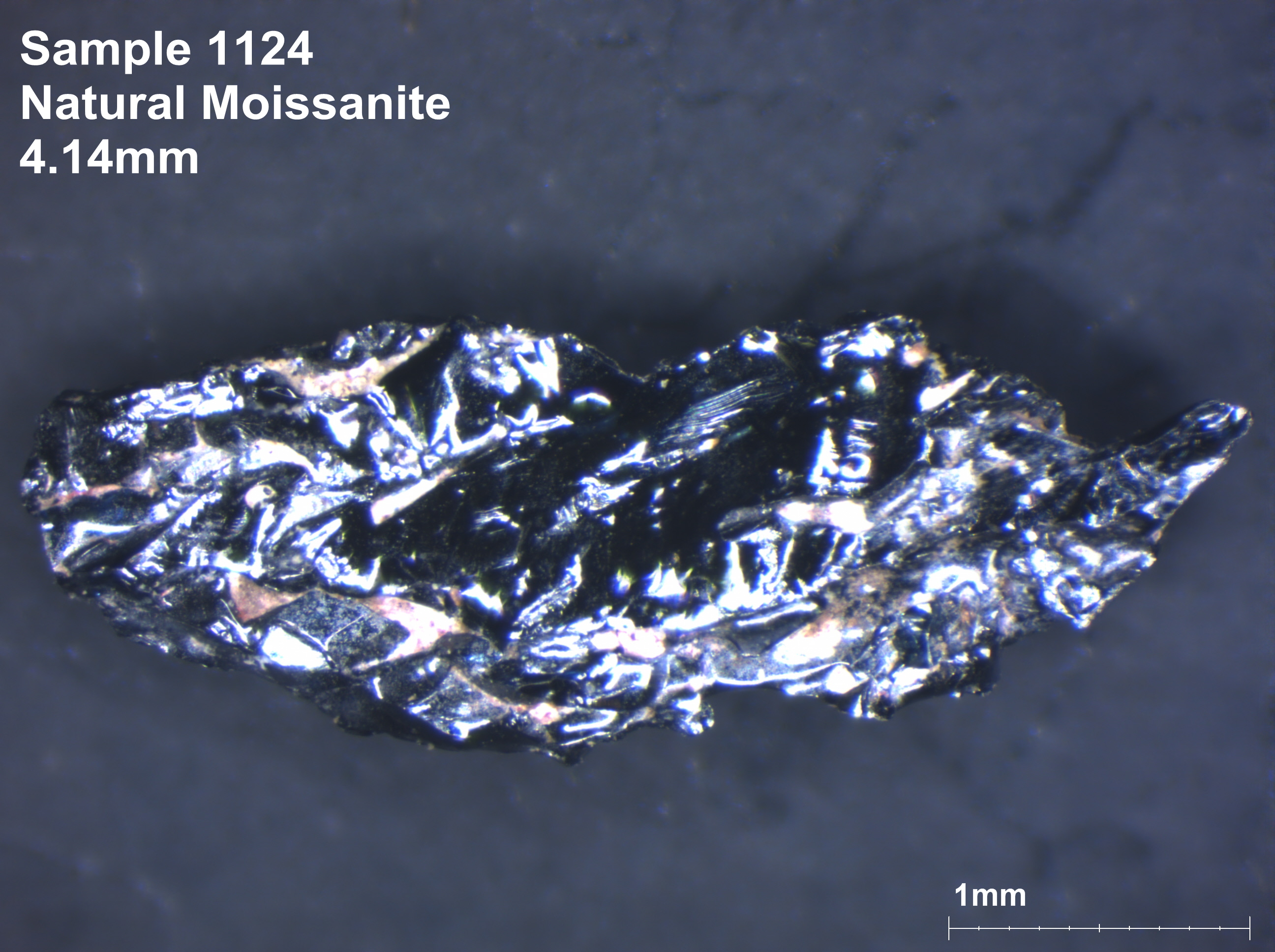 Natural Moissanite 4.14mm Found by Shefa Yamim